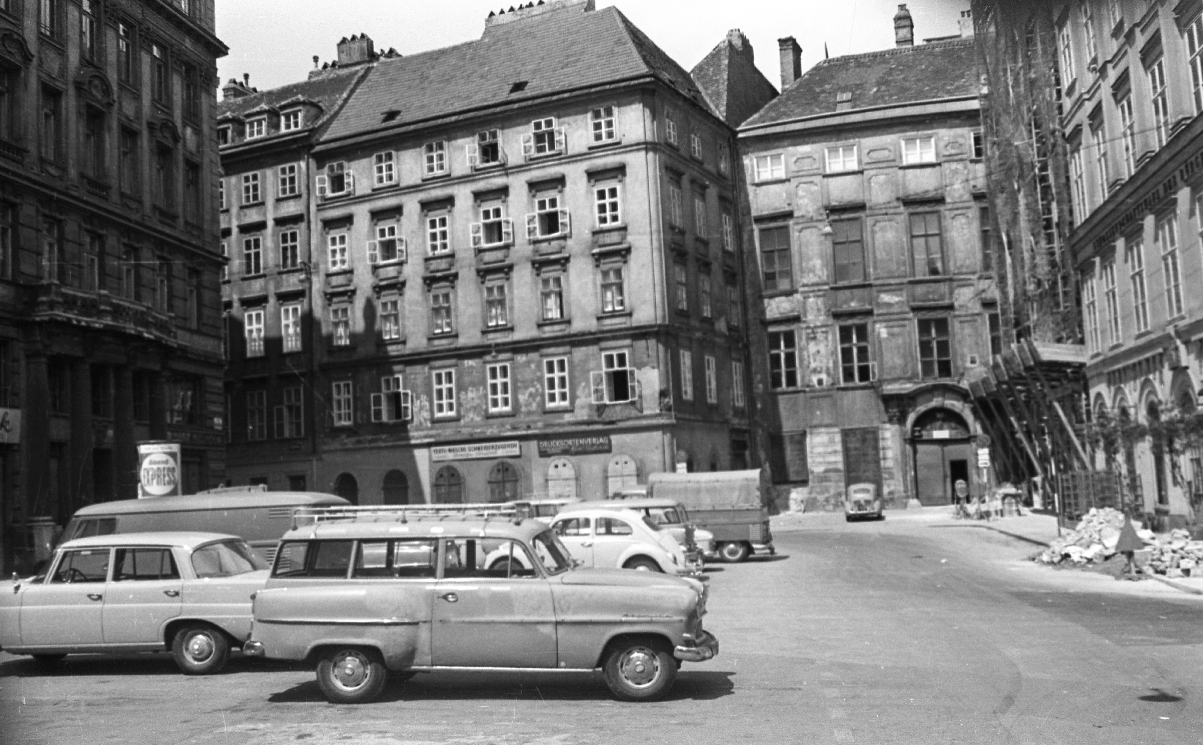 Judenplatz, balra a Drahtgasse torkolata. Location: Austria, Vienna Title: Judenplatz, balra a Drahtgasse torkolata.